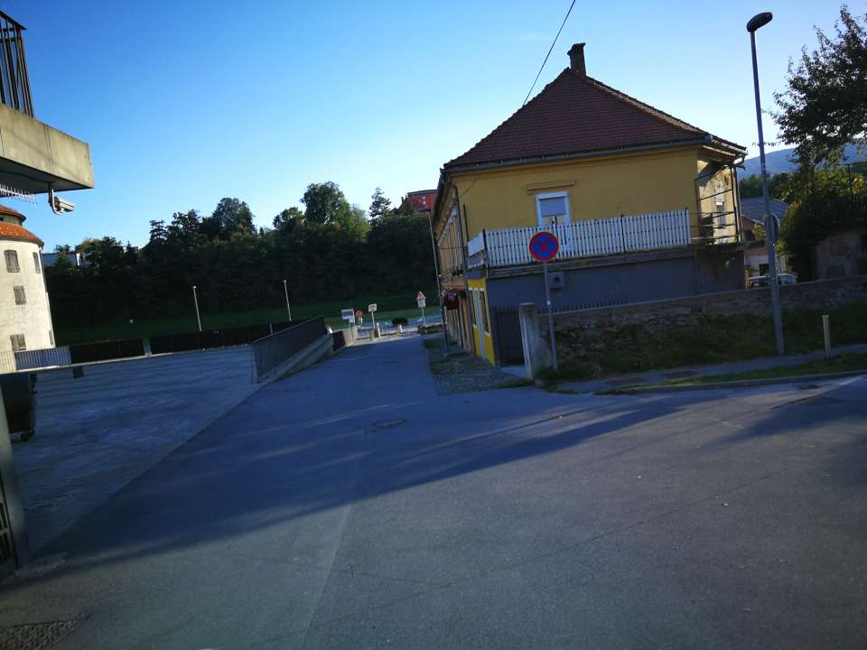 Pogled od Vodnikovega trga proti Dravi